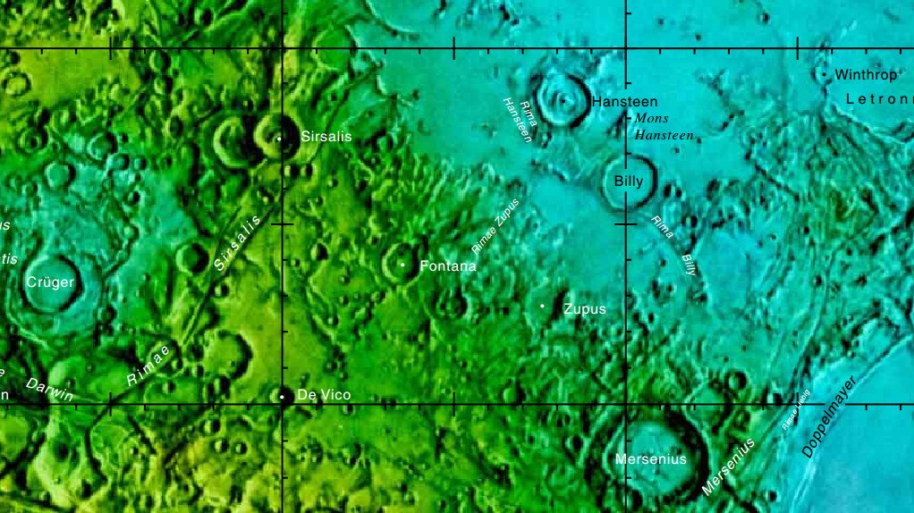 Cráter lunar Fontana. Localización. (Imagen LROC)